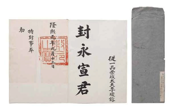 조선말: 1907년 9월 12일 이준용을 영선군에 봉한다는 교지